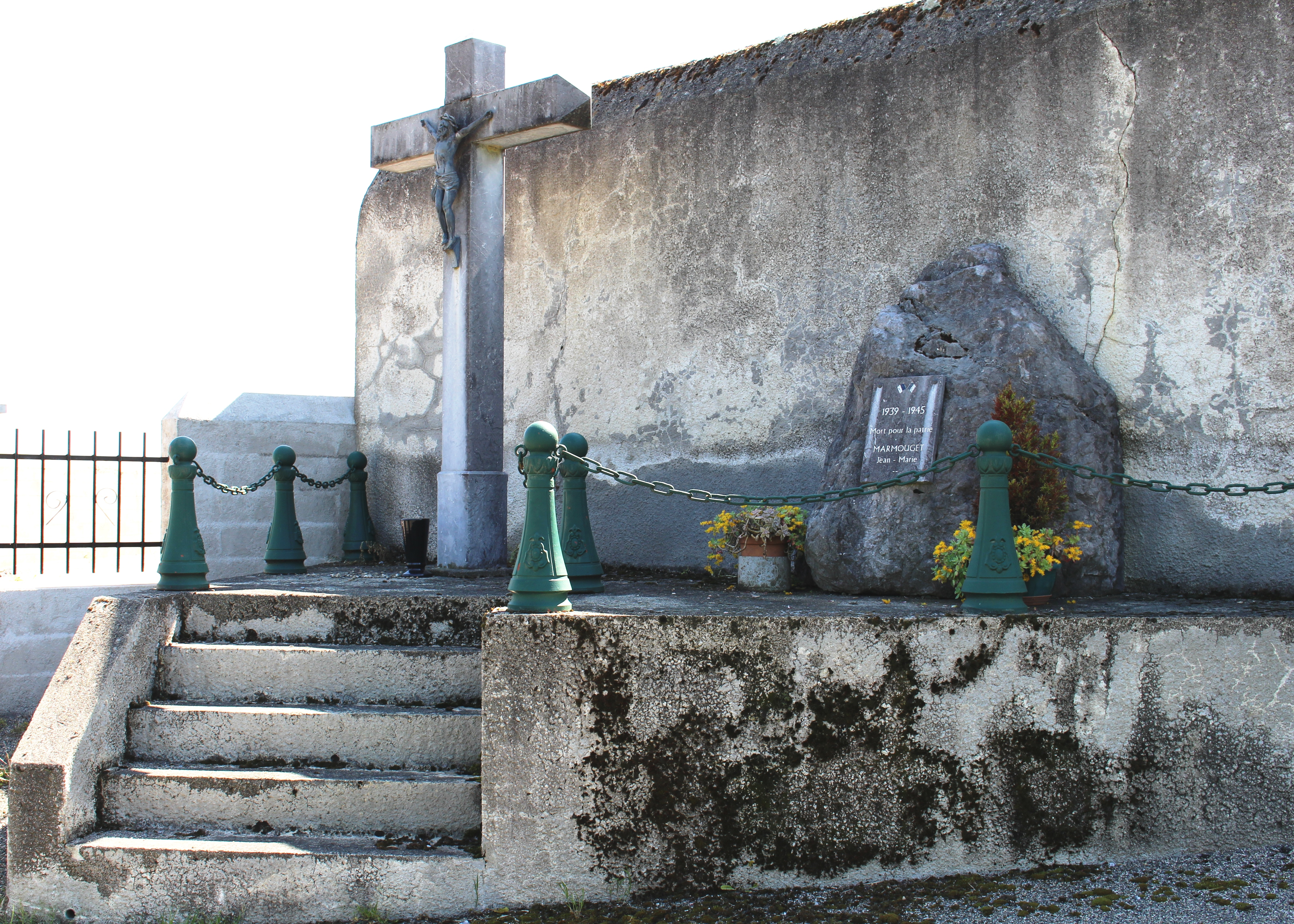 Monument aux morts de Fréchou-Fréchet (Hautes-Pyrénées)